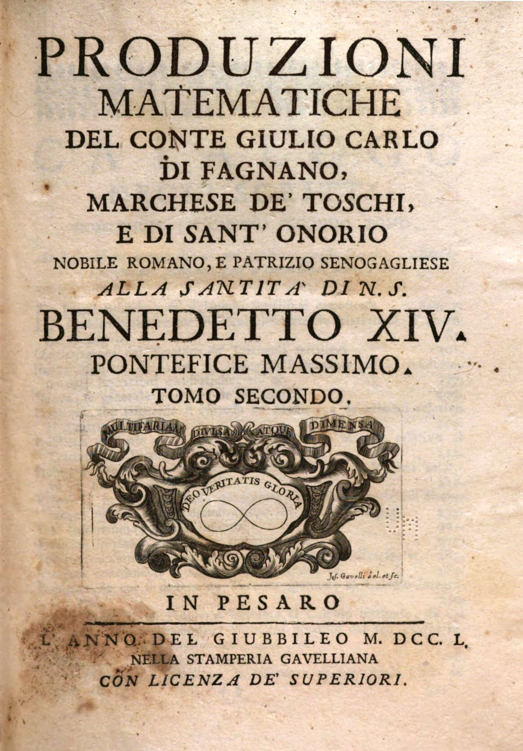 Produzioni matematiche del conte Giulio Carlo di Fagnano, marchese de' Toschi, e di Sant'Onorio nobile romano, e patrizio senogagliese alla santita' di n.s. Benedetto 14. pontefice massimo. Tomo primo [-secondo]. 2. - In Pesaro : nella stamperia Gavelliana, 1750. - XII, 536 p., VII, II, VII c. di tav. ripiegate : ill. calcografiche - Vignetta calcogr. incisa da Giuseppe Gavelli sui frontespizio .